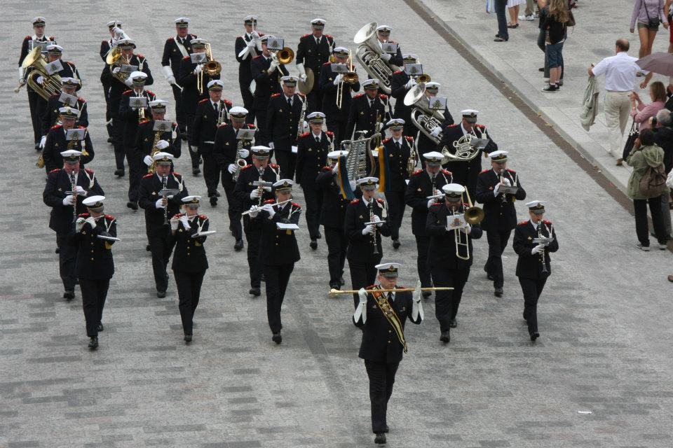 Hemvärnets musikkår Uppsala på Norrbro under vaktparaden i Stockholm.